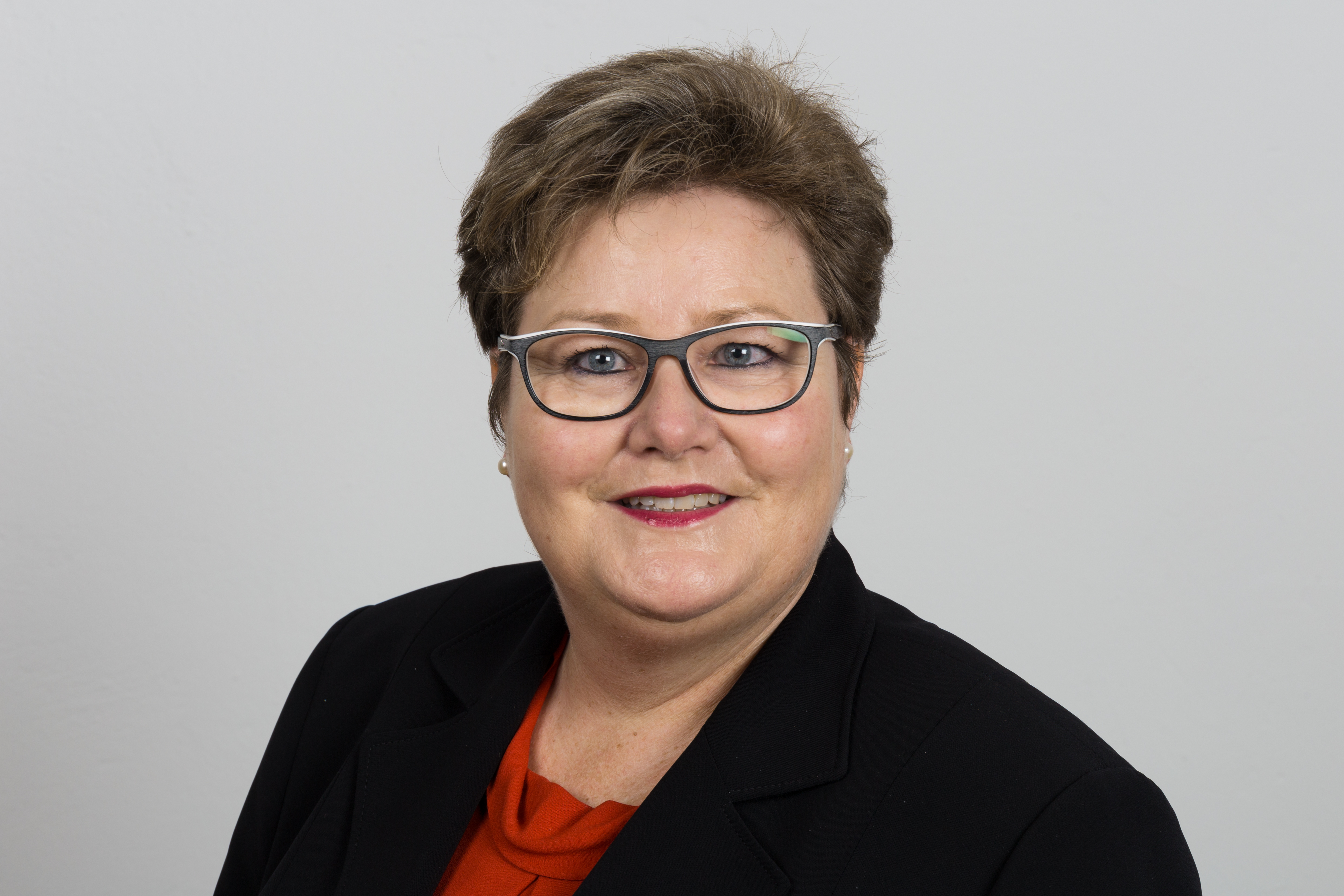 Bettina Brück (* 6. November 1967 in Hermeskeil jetzt Trier) ist eine deutsche Politikerin (SPD) und Mitglied des rheinland-pfälzischen Landtags.